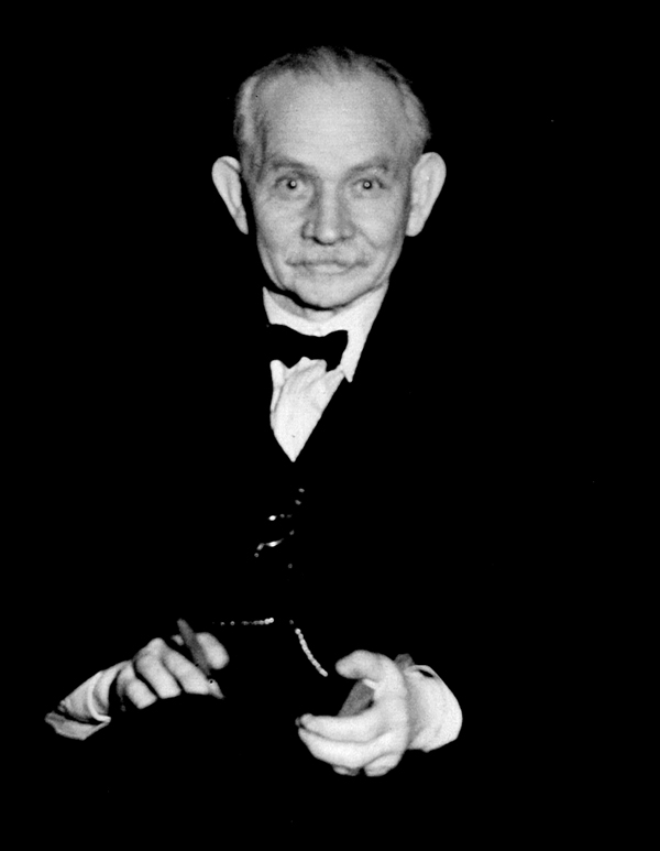 Martin Julius Halvorsen